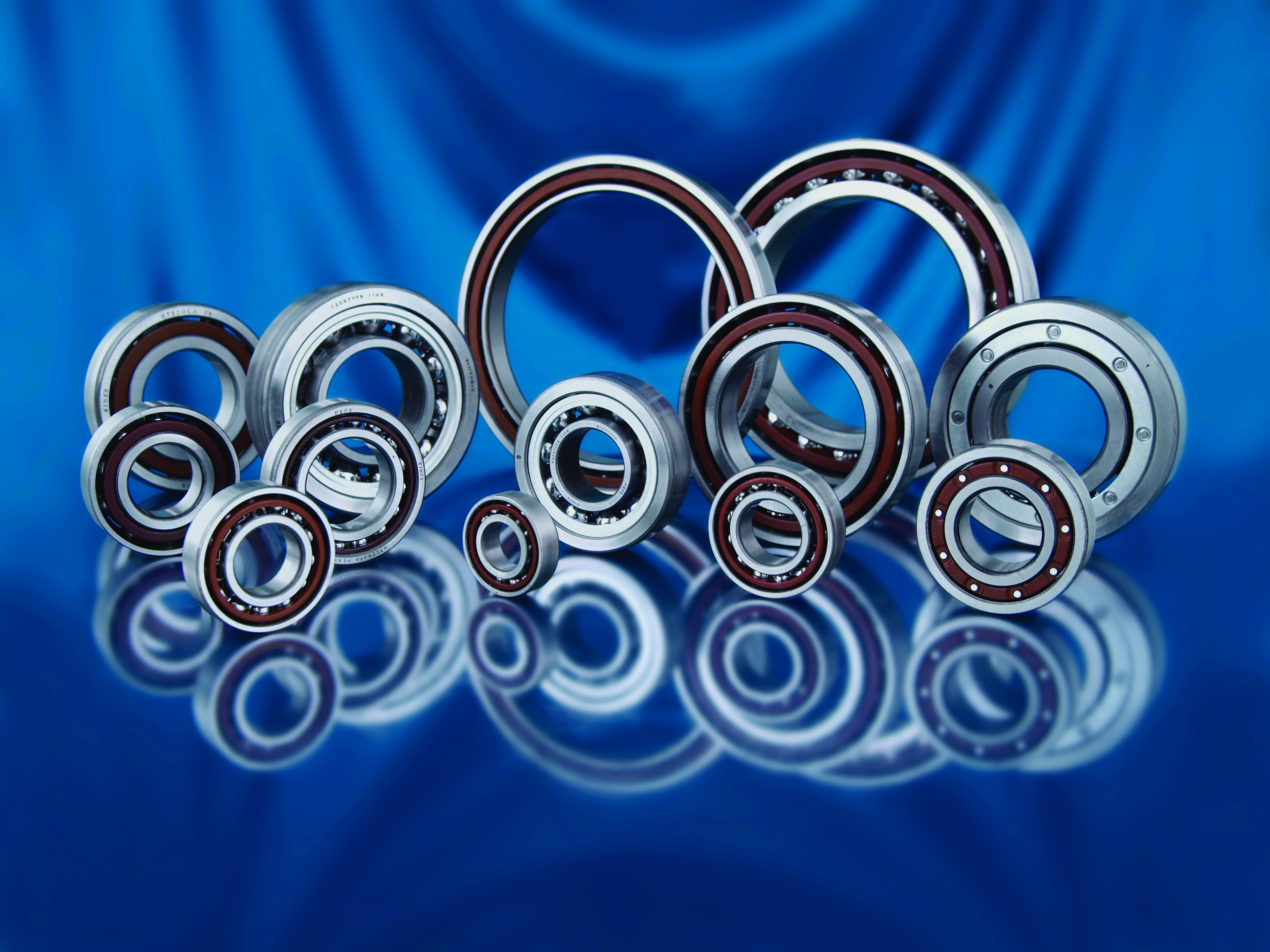 Presné ložiská